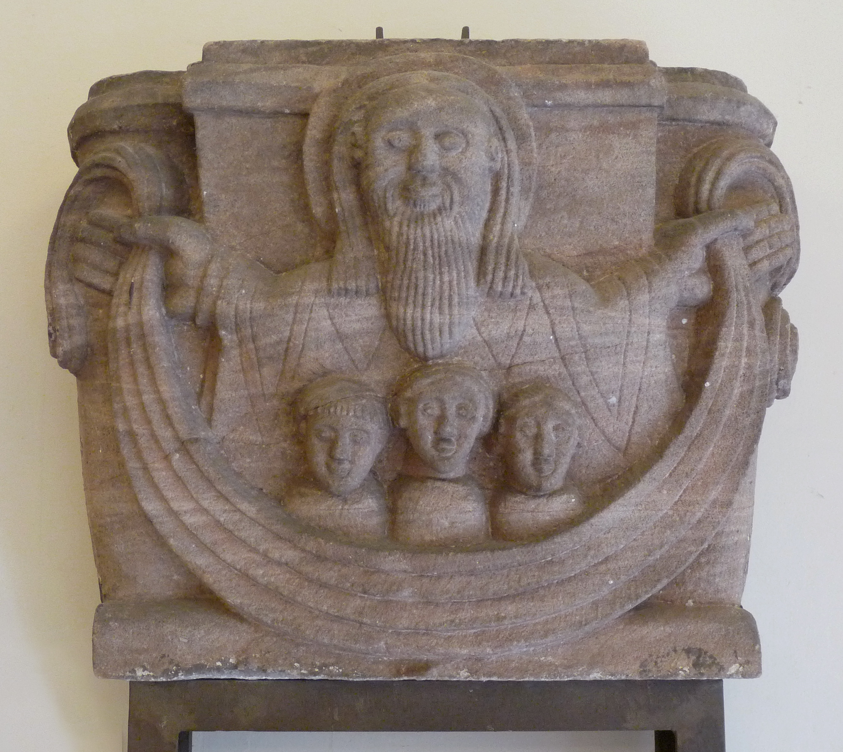 Musée Unterlinden (Colmar) : chapiteau recevant les arcs doubleaux de la nef, église abbatiale d'Alspach. Milieu du XIIe siècle. Représente les Justes dans le sein d'Abraham.